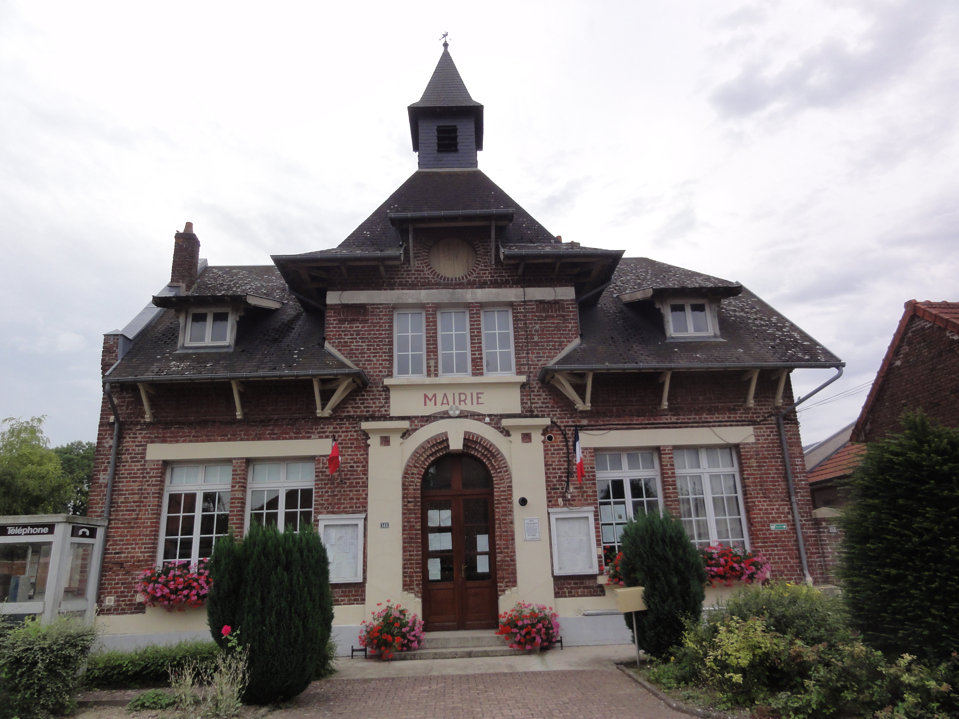 Sequehart (Aisne) mairie